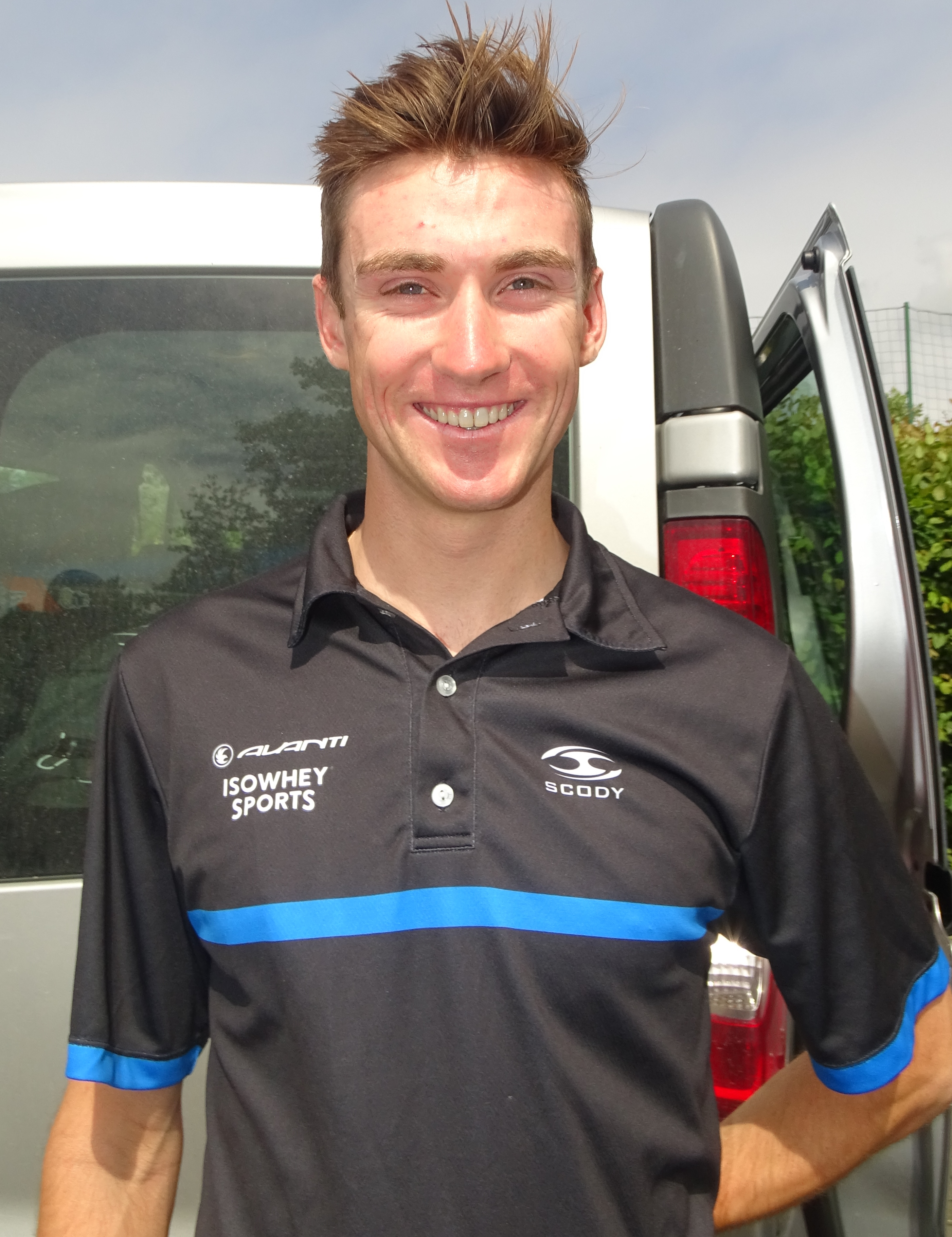 Reportage réalisé le mercredi 22 juin à l'occasion du départ de Halle-Ingooigem 2016 à Hal, Belgique.